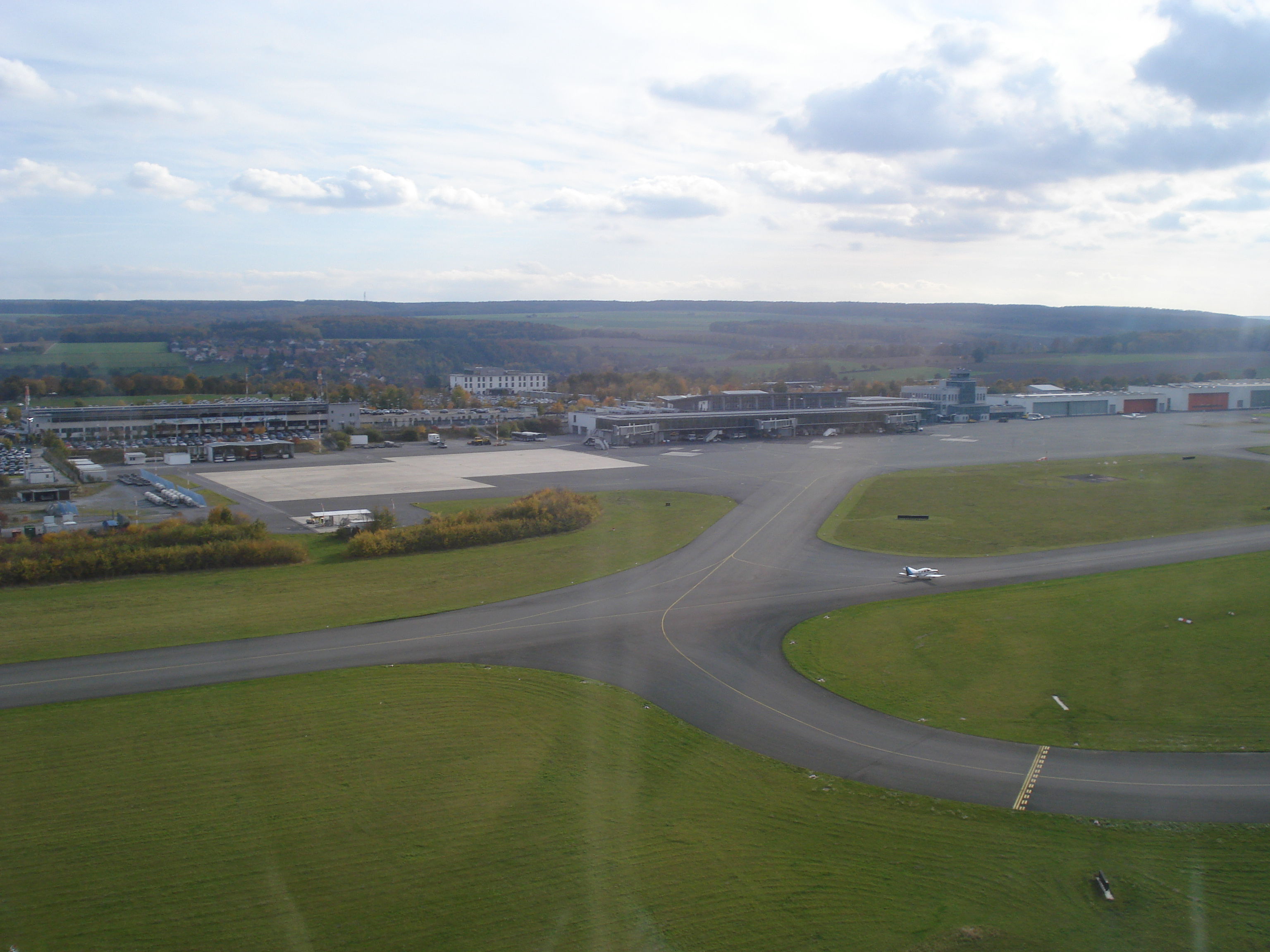 Terminal vom Flughafen Paderborn/Lippstadt, Gemeindegebiet von Büren